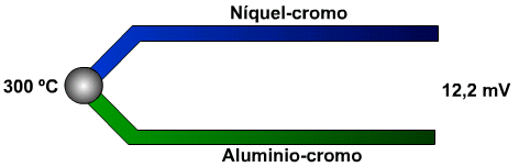 Descripción: esquema del funcionamiento de un termopar de tipo K a una temperatura de 300 ºC. Autor: Luis María Benítez. Enlaces relacionados: Termoelectricidad, célula Peltier, Efecto Seebeck, Efecto Peltier, Efecto Thomson, Generador termoeléctrico. Enlaces externos: Introducción a la termoelectricidad, , Termoelectricidad, el “Arte de Refrigerar”, International Thermoelectric Society (ITS), [1], [2], [3], , , [4], [5], , , [6], [7], A Ladder Thermoelectric Parallelepiped Generator, The Ladder Hypothesis, High Frequency Thermoelectric Generator, Varmaraf.